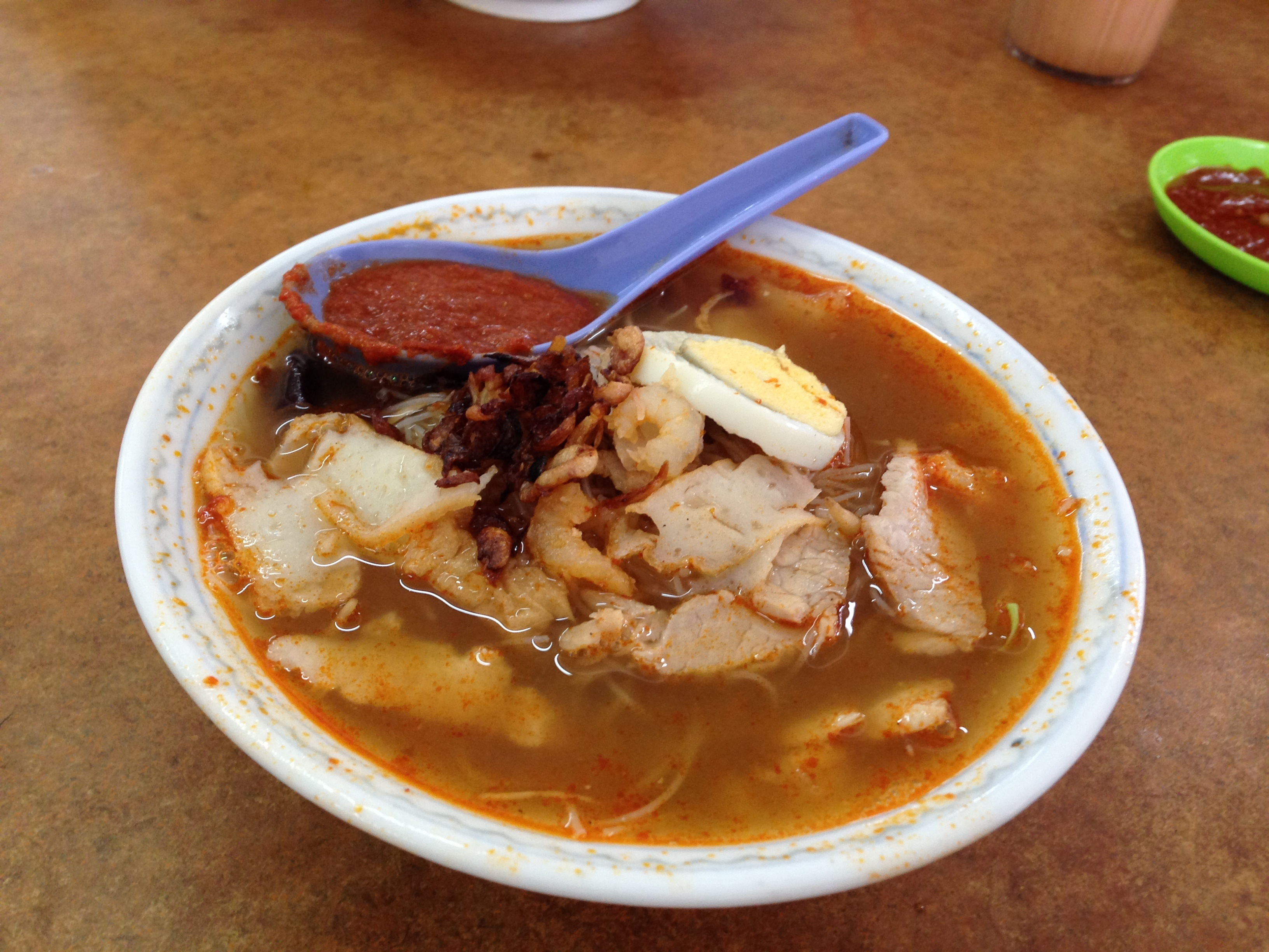 Penang Har Mee Sold in Parit Buntar